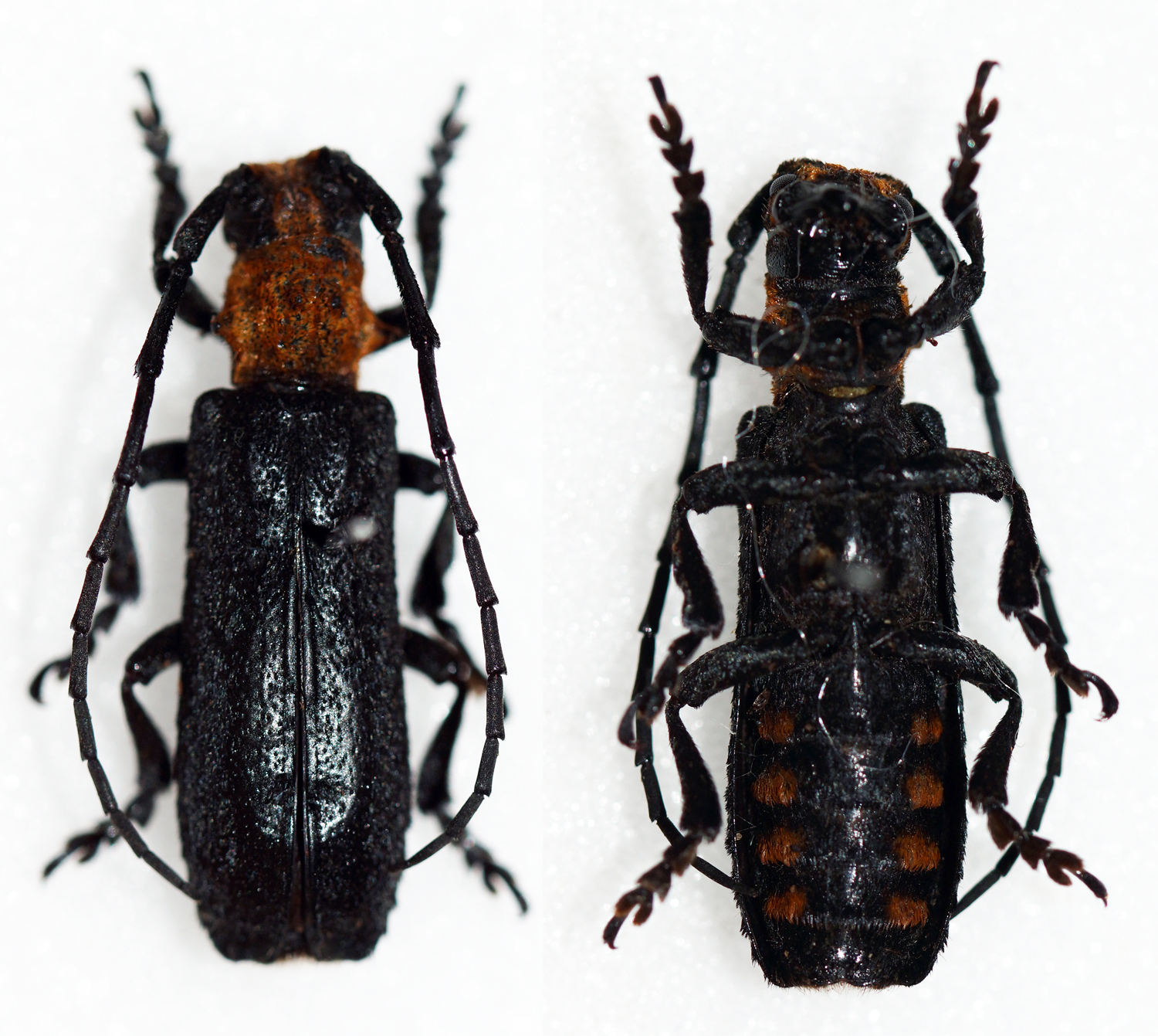 Quedenfeldt,1881 Sex: ? Data: 31-03-08 - Morogoro - Kigulu-nyembe - Uluguru Mt - Tanzania Size: 21mm